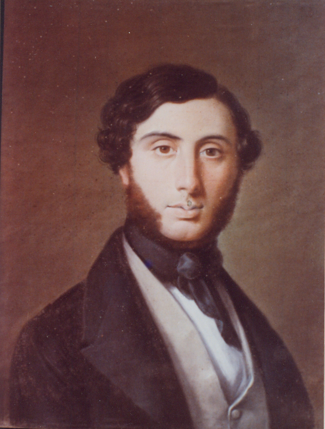 Pedro Gil y Serra, empresario español (1815- 1877).